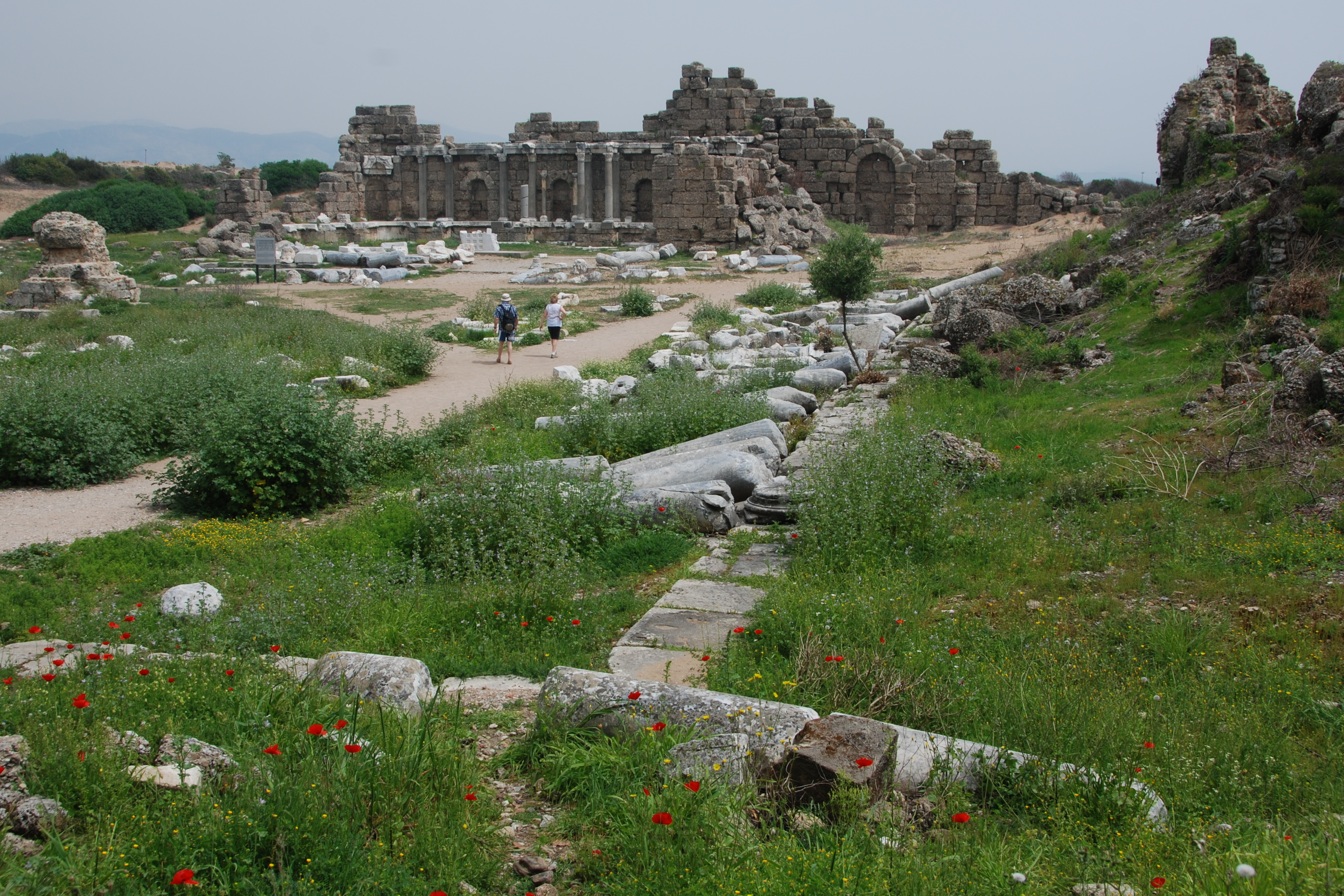 Viele Säulentrommeln der Kolonnaden blieben an Ort und Stelle liegen.